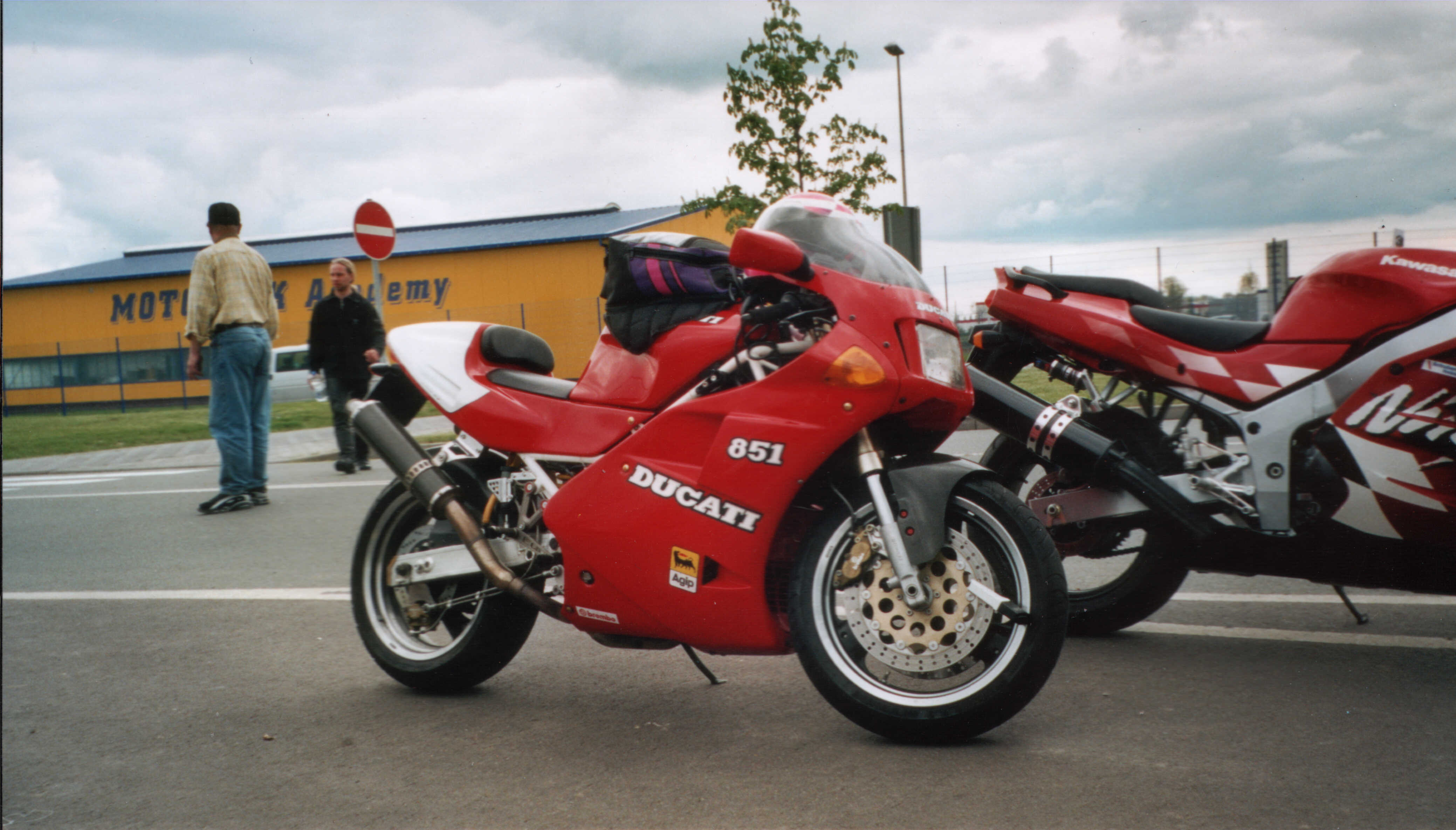 Ducati 851 im Sommer 2002 auf dem Festival Italia in Oscherleben